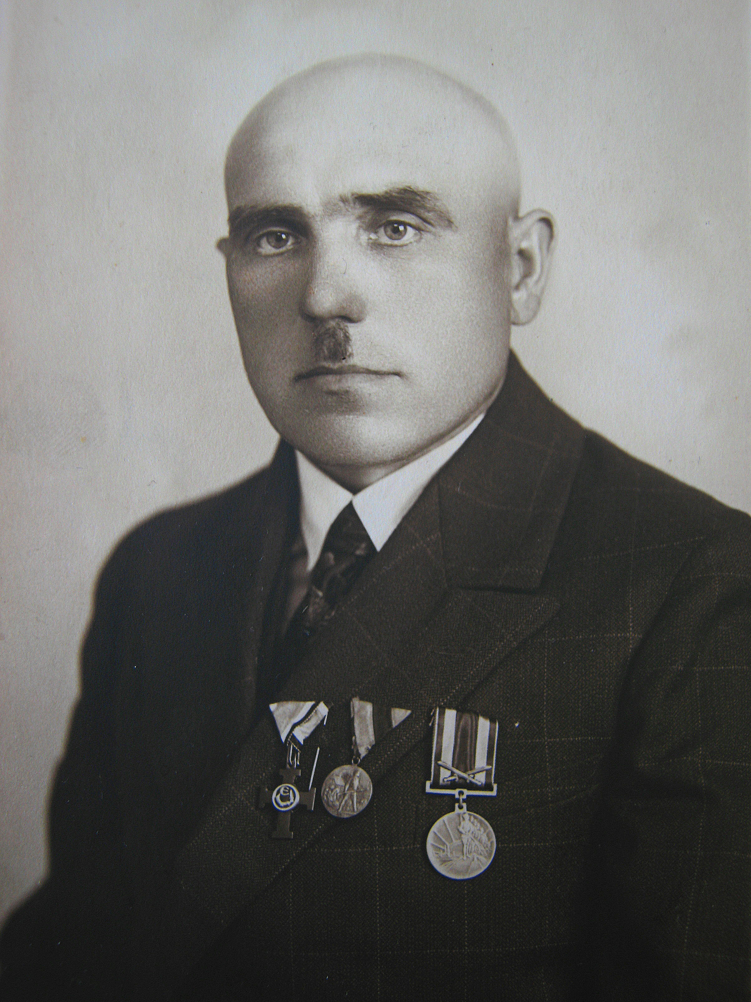 Georg Suurevälja